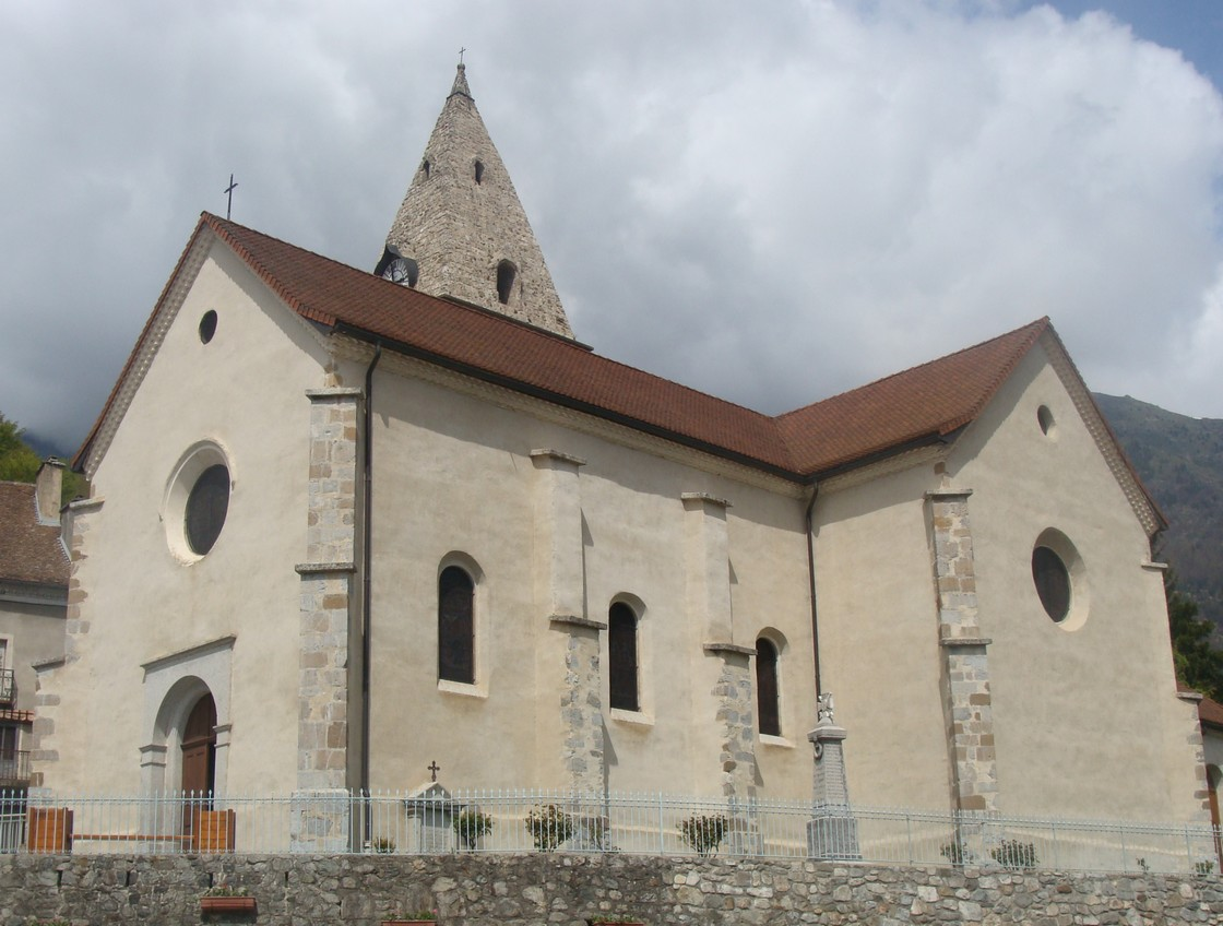 L'église paroissiale de Saint-Firmin (Hautes-Alpes), vue extérieure depuis la place principale du village.